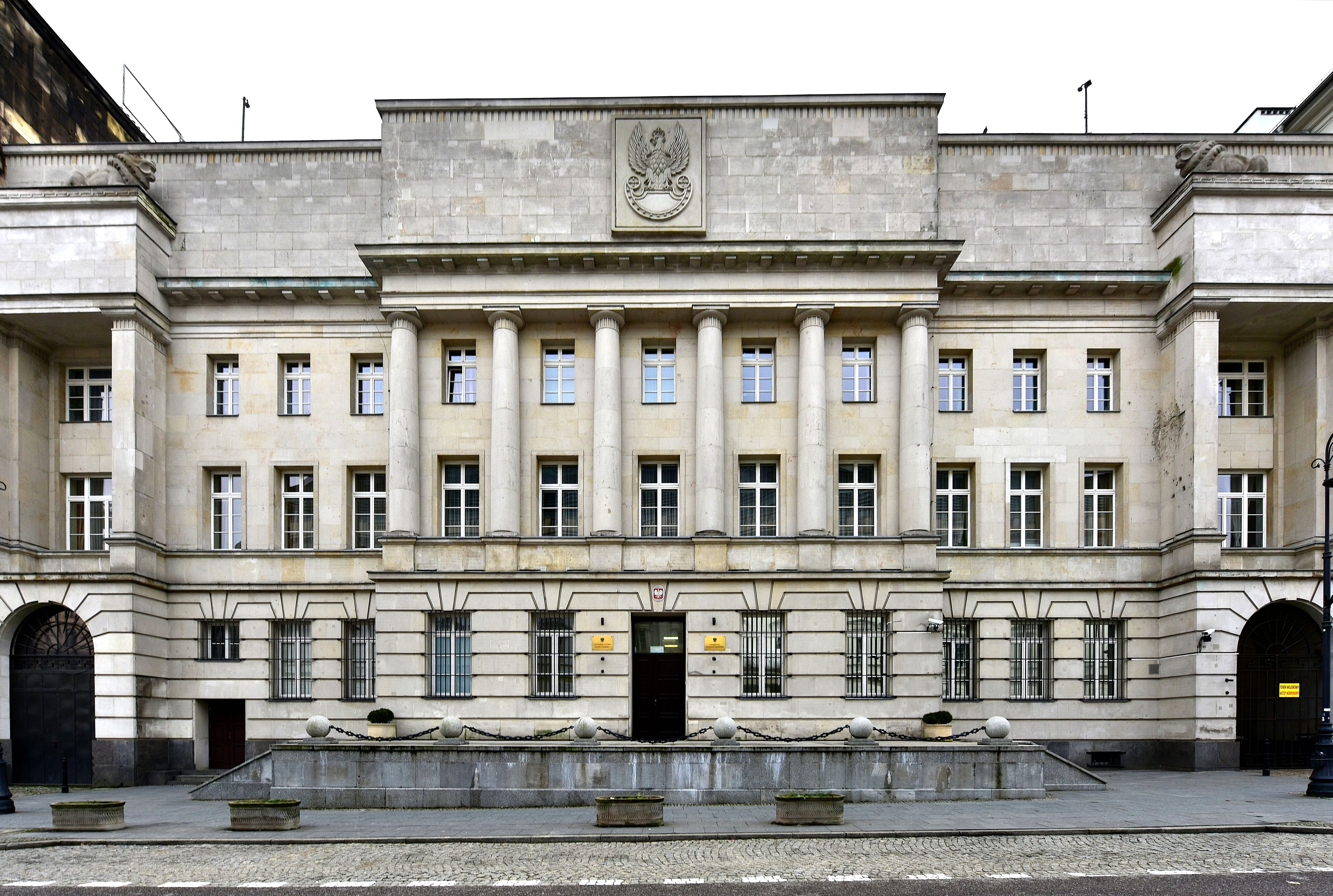 Budynek dawnej Komendy Miasta przy ul gen. M. Karaszewicza-Tokarzewskiego 4 w Warszawie